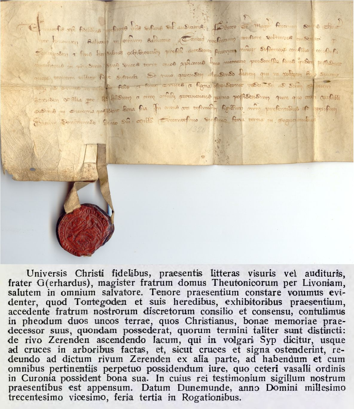 Plicken (Pliķuciems): Lehnsurkunde des Ordensmeisters Gerhard an den Lehnsnehmer Martin Tontegode aus dem Jahr 1320